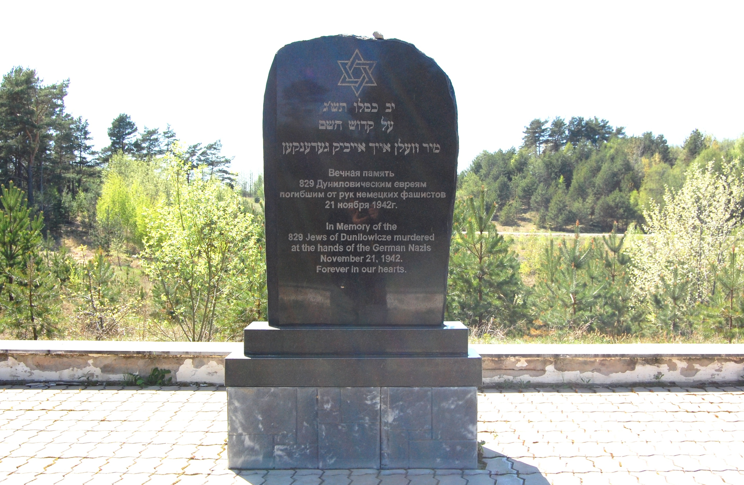 Памятник евреям - узникам гетто в Дуниловичах, убитых немцами и полицаями 21 ноября 1942 года.